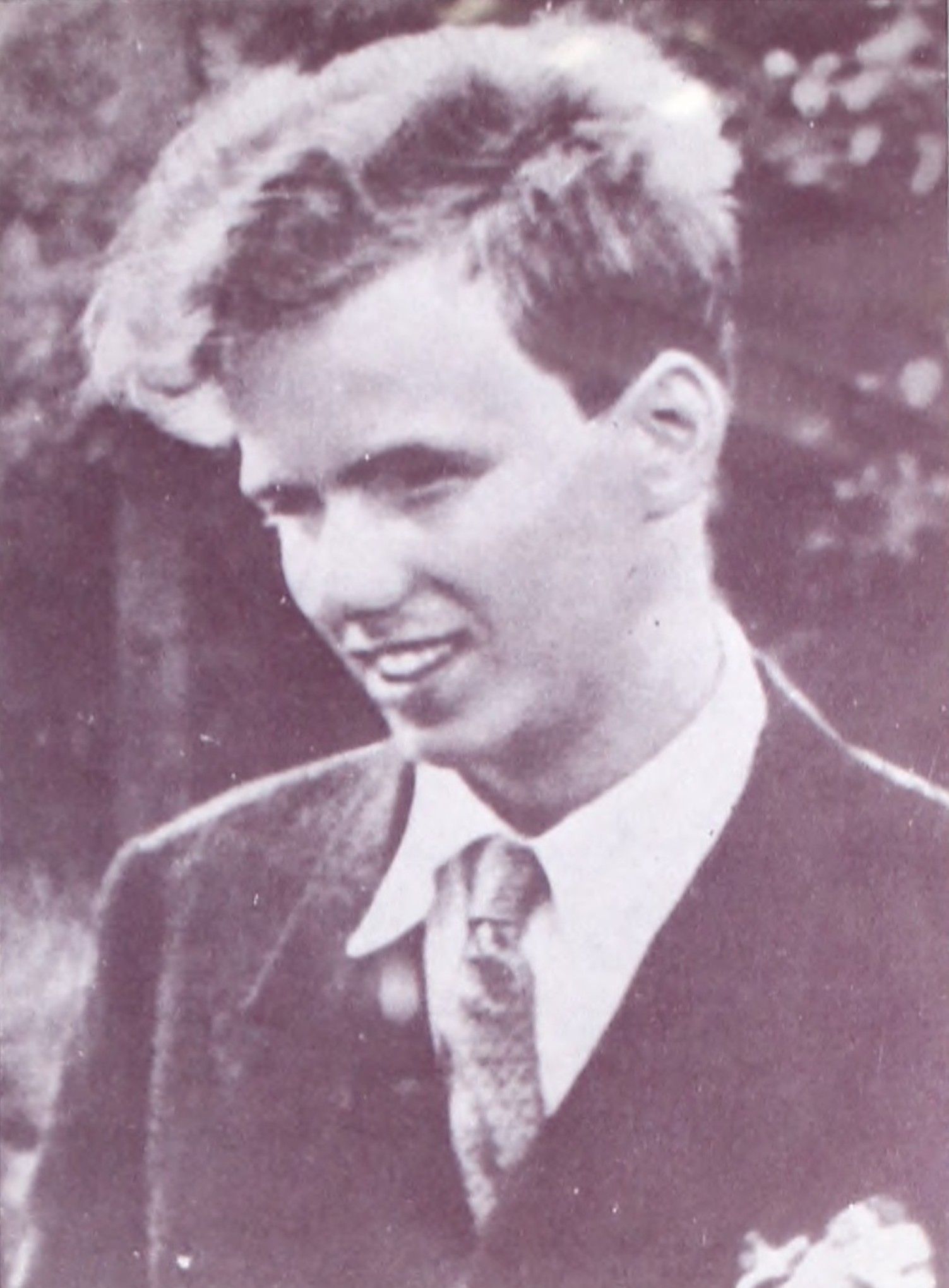 Јурица Рибар (1918-1943), сликар, партизан и брат Иве Лоле Рибара